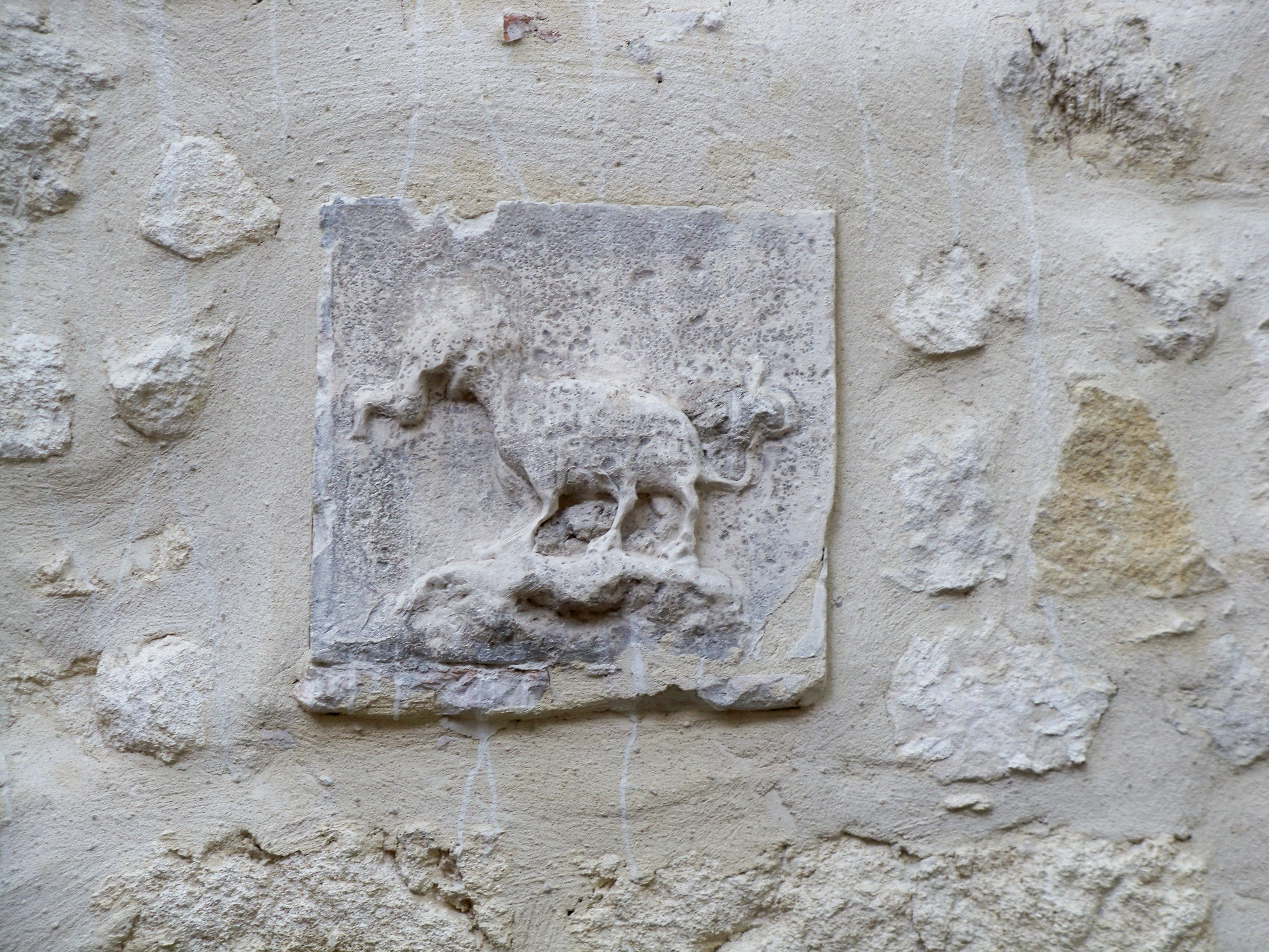 Tarasque, rue de Teinturiers, Avignon, Vaucluse, France